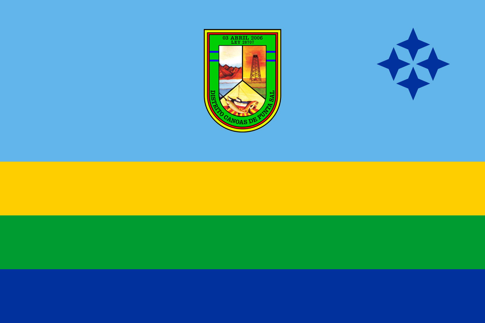 Escudo del distrito Canoas de Puntal Sal, Provincia de Contralmirante Villar, Región Tumbes